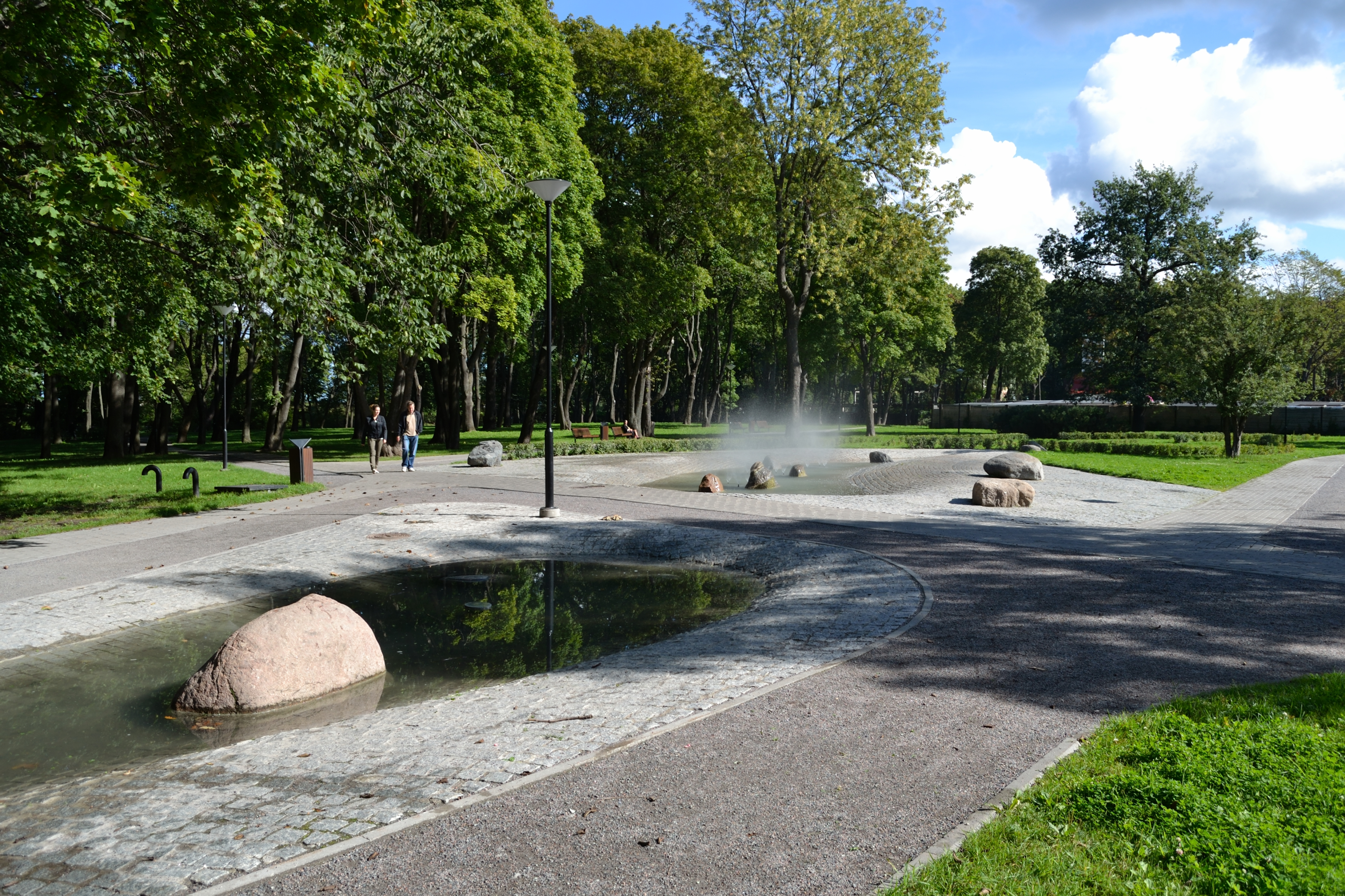 Kalamaja kalmistu-park